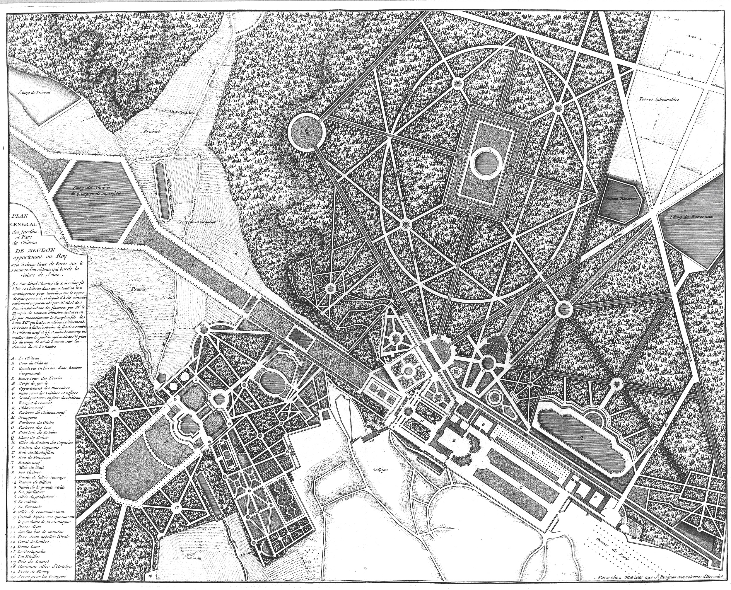 Château de Meudon, jardins et parc